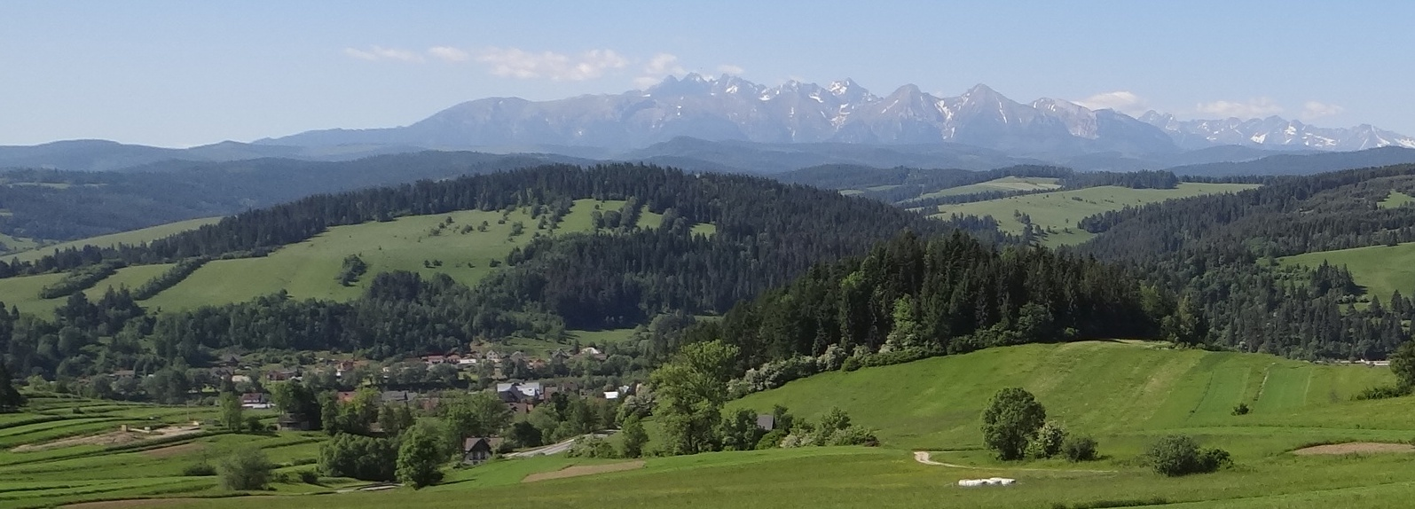 Malinowa Góra i Sołtysia Skała w Sromowcach Wyżnych. W głębi Tatry